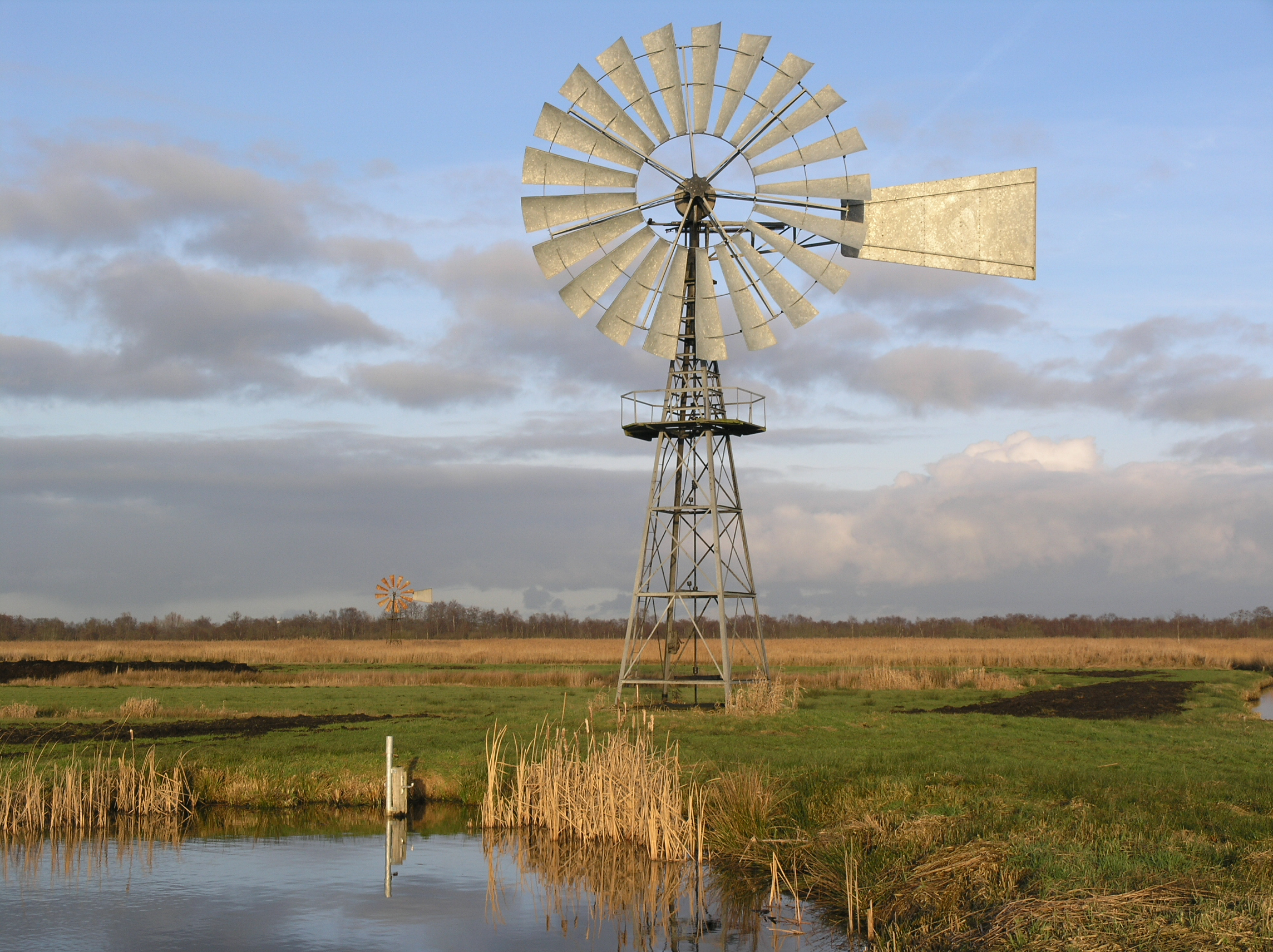 Nijetrijne Windmotor Schokker